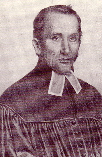 Erster evangelisch-lutherischer Pfarrer der Kirchengemeinde in Ofen (heute Budapest), die 1847 gegründet wurde.